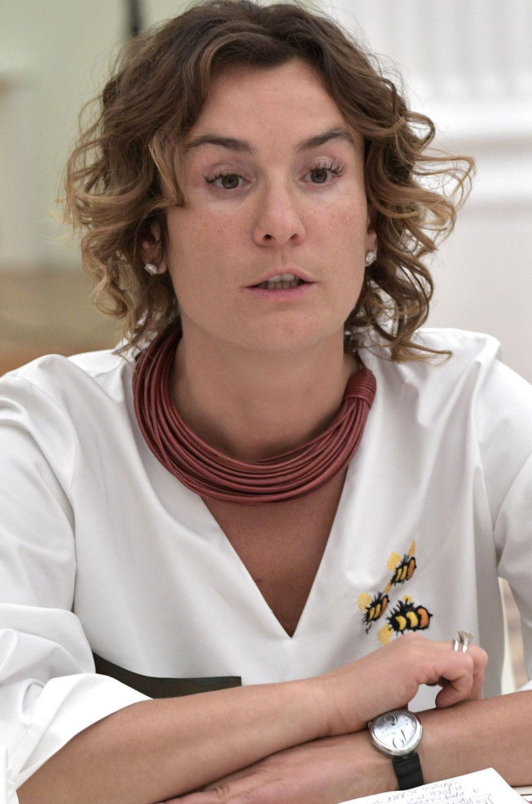 Председатель правления ФГУП «Творческо-производственное объединение «Киностудия «Союзмультфильм» Юлиана Слащева во время встречи с Президентом России Владимиром Путиным